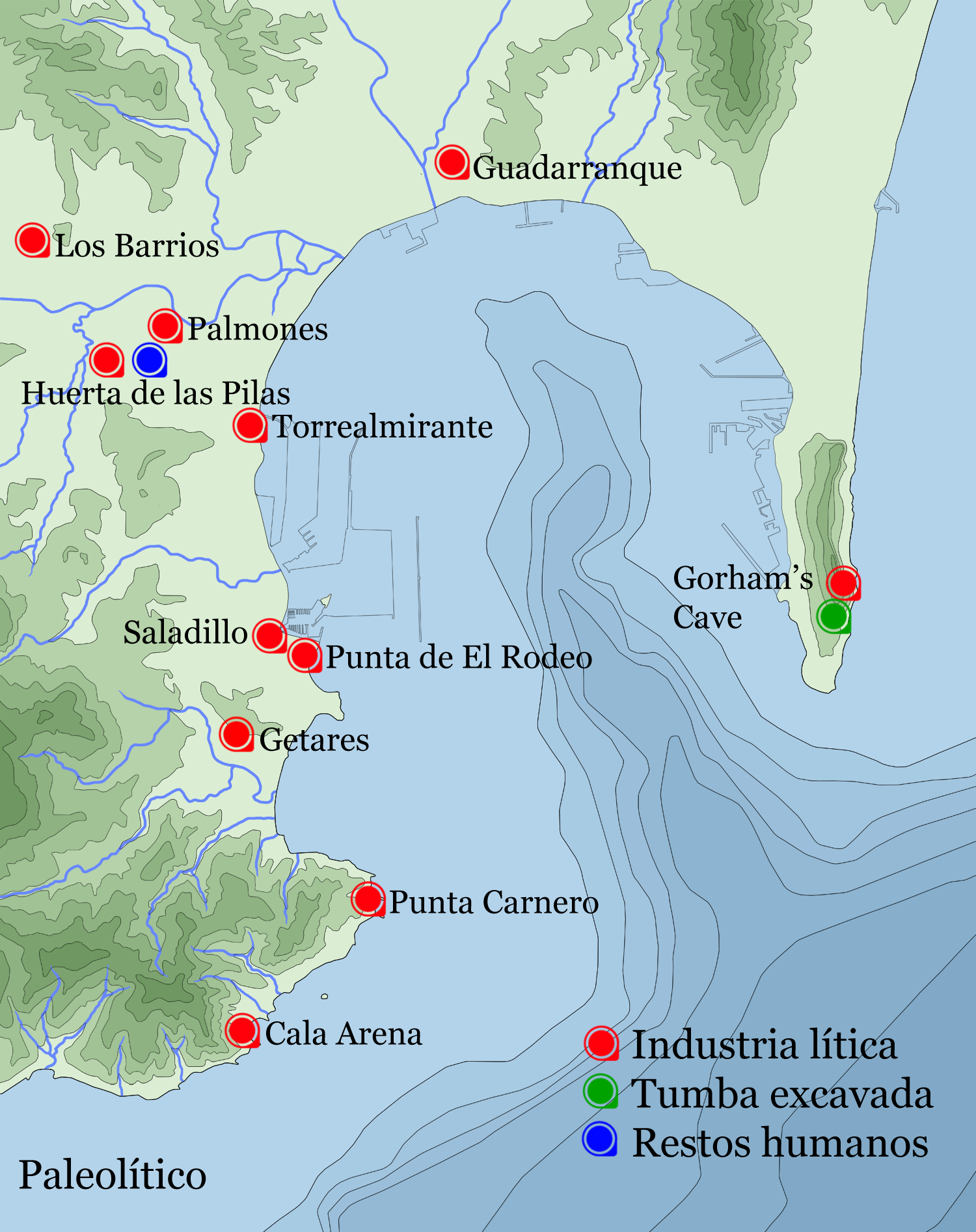 Mapa indicativo de los yacimientos paleolíticos de la bahía de Algeciras, Andalucía, España.